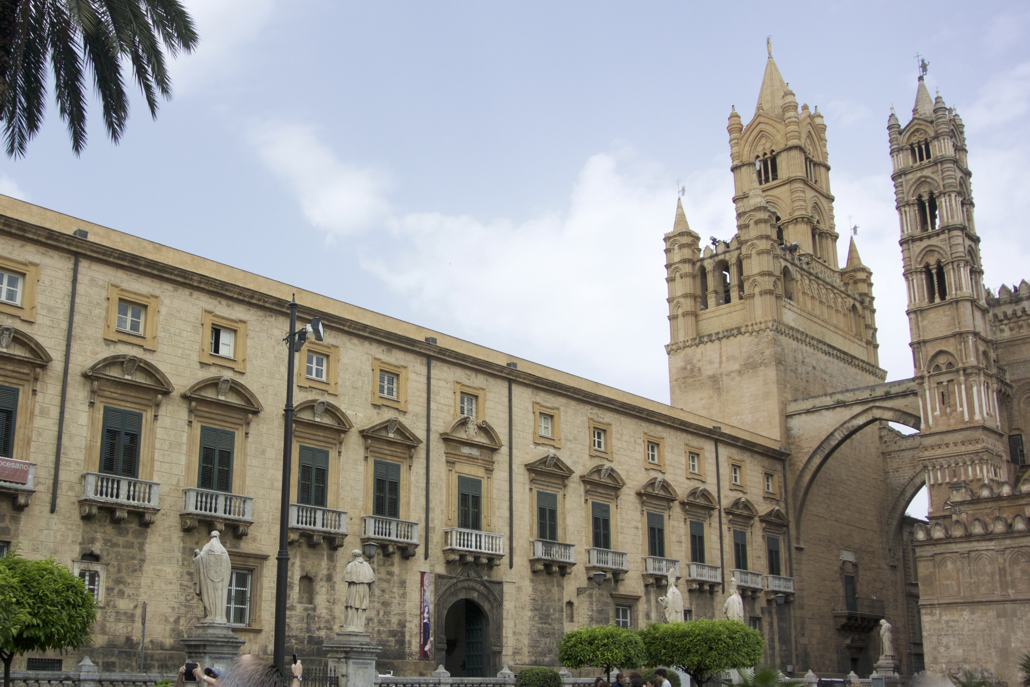 Palais archiépiscopal actuel musée diocésain-collection d'art lithurgique et oeuvres de la Cathédrale attenante.